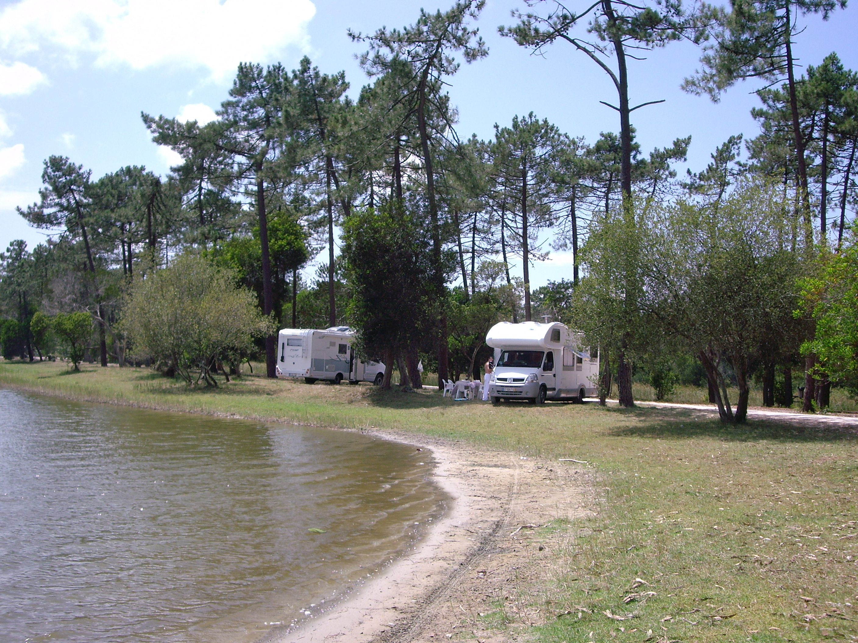 Lagoa da Vela - Largo dos eucaliptos, caravanas junto à lagoa